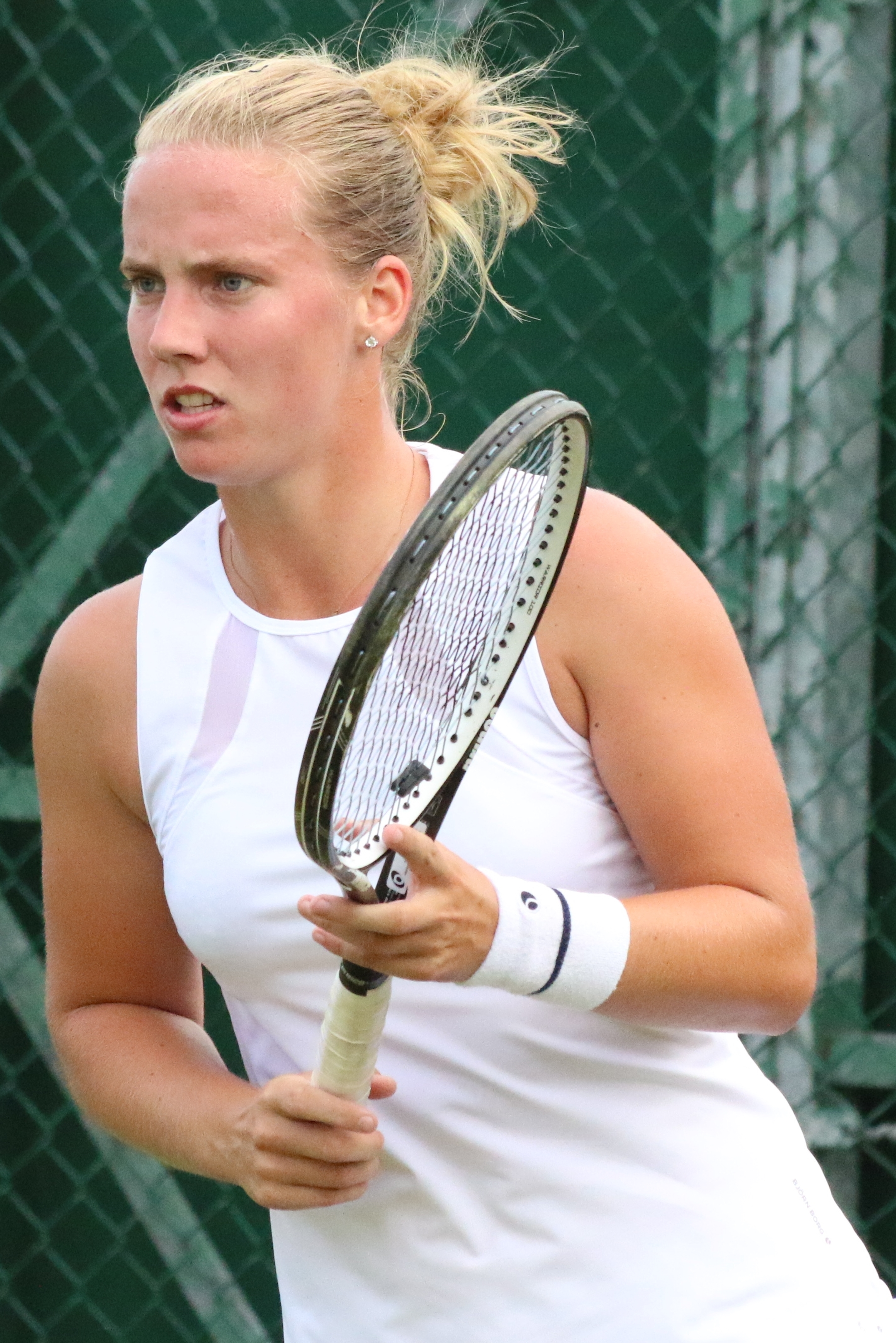 Hogenkamp WMQ16 (4)